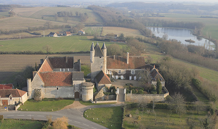 Vue aérienne oblique du Château de Bridoré.